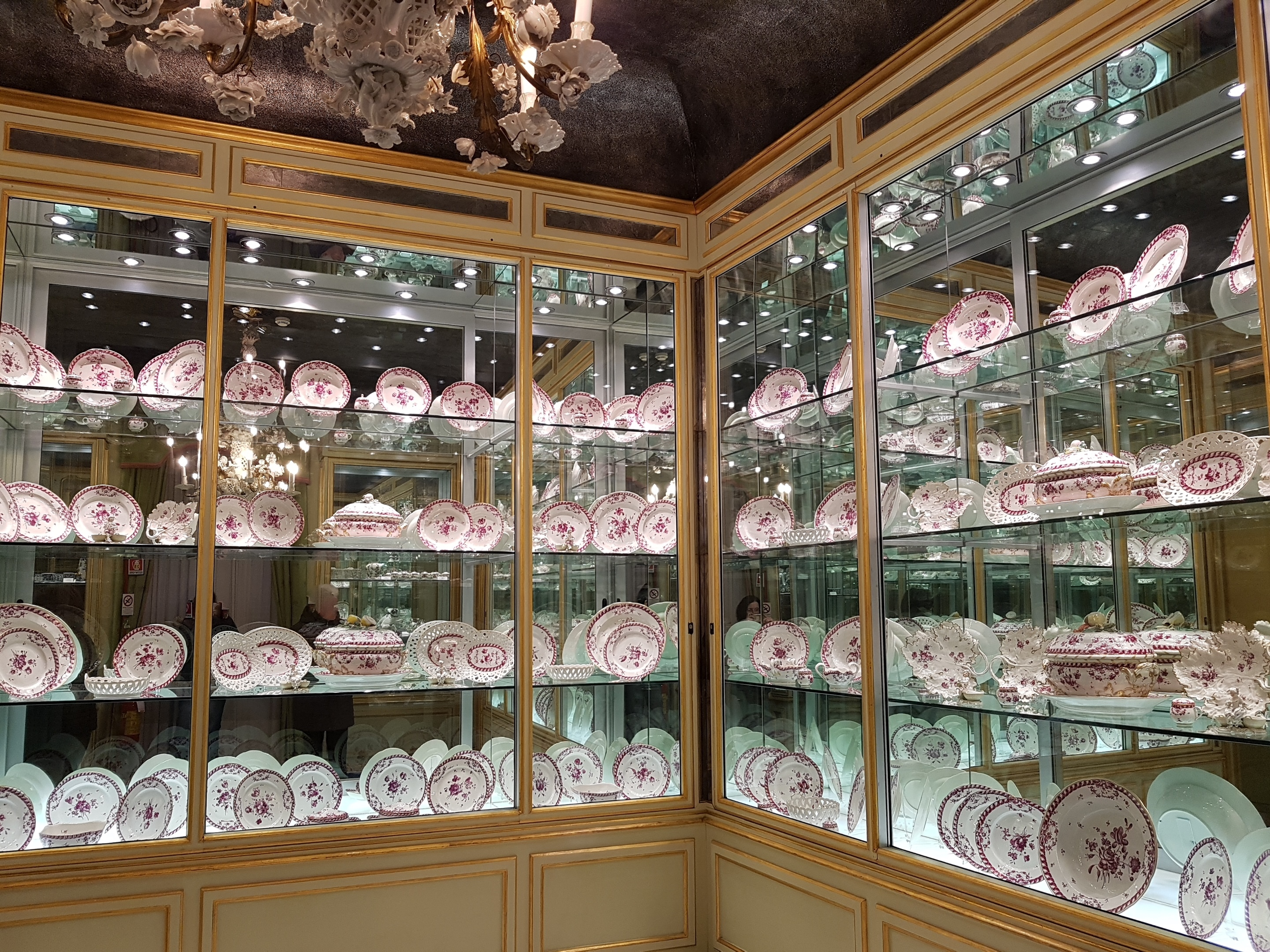 Sala dei servizi in Porcellana, Museo di Arti Decorative Accorsi–Ometto, Torino